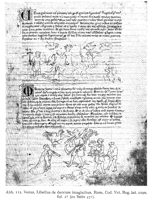 Eine Seite aus dem Büchlein, hierːAnweisung zur Gestaltung der Göttin Venus (oben) für Maler, Manuskript mit Illustrationen